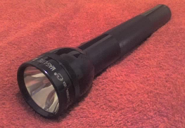 Imagem de coleçao propria, obtida atraves de camera, nao retirado da web.obtido atraves de fotos de acervo da minha coleçao e gentilmente cedidas para a Wikipedia por mim mesmo e estando livre para qualquer finalidade ligada ao uso de coleçao ou simpatia a mesma.